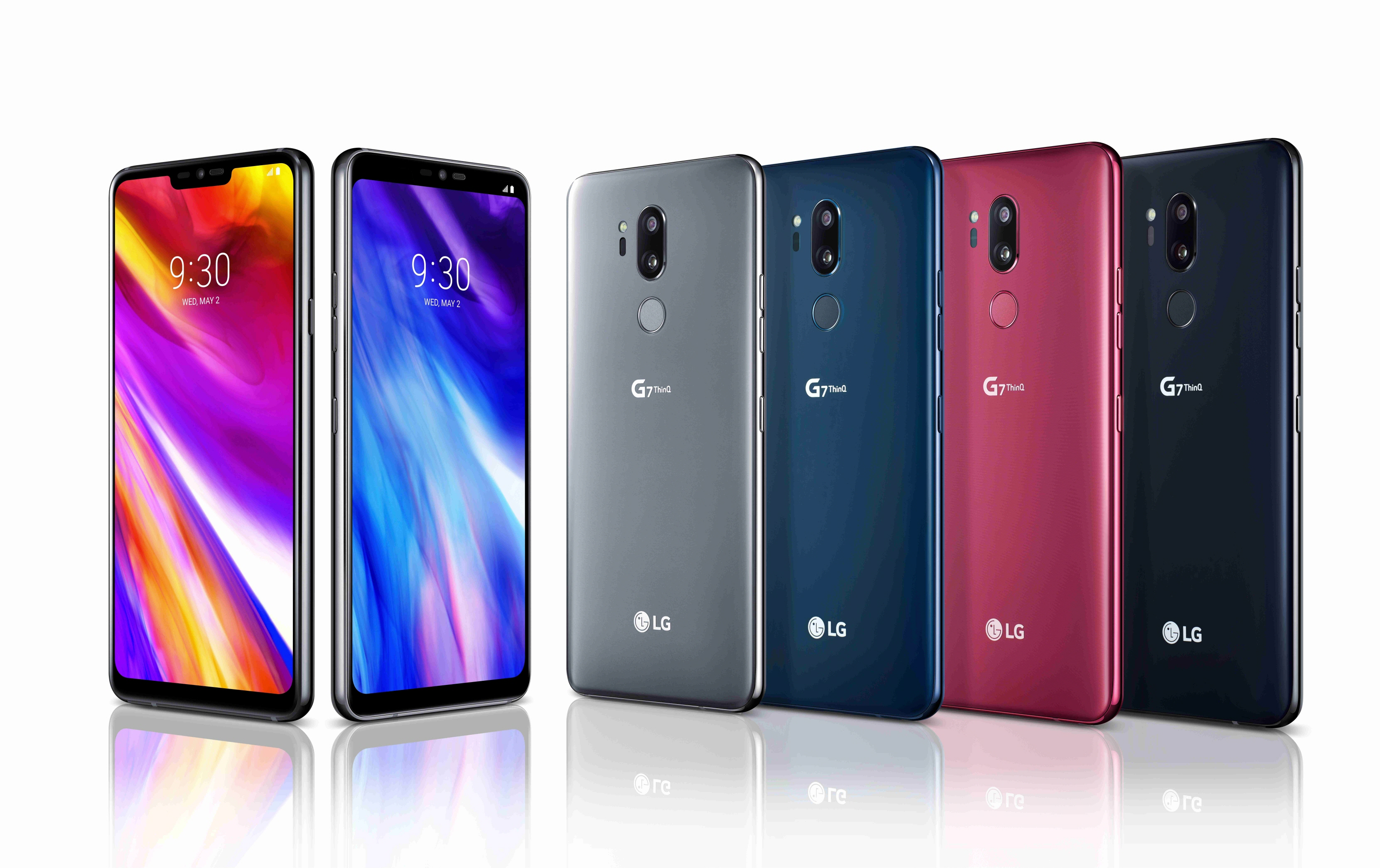 2일 LG전자는 美 현지 및 글로벌 언론들을 초청해 한층 업그레이드된 스마트폰의 핵심 기능과 생활의 편리함을 더한 AI를 담은 차기 프리미엄 전략 스마트폰 LG G7 ThinQ를 소개했다. LG G7 ThinQ 는 역대 가장 높은 소프트웨어 안정성과 하드웨어 내구성을 바탕으로 스마트폰의 기본이 되는 디스플레이.오디오.카메라 등의 기능을 강조해 차별화를 했다. 또 쓸수록 편리한 AI 기능들을 업그레이드해 누구나 쉽게 사용할 수 있도록 한 것이 특징이다.